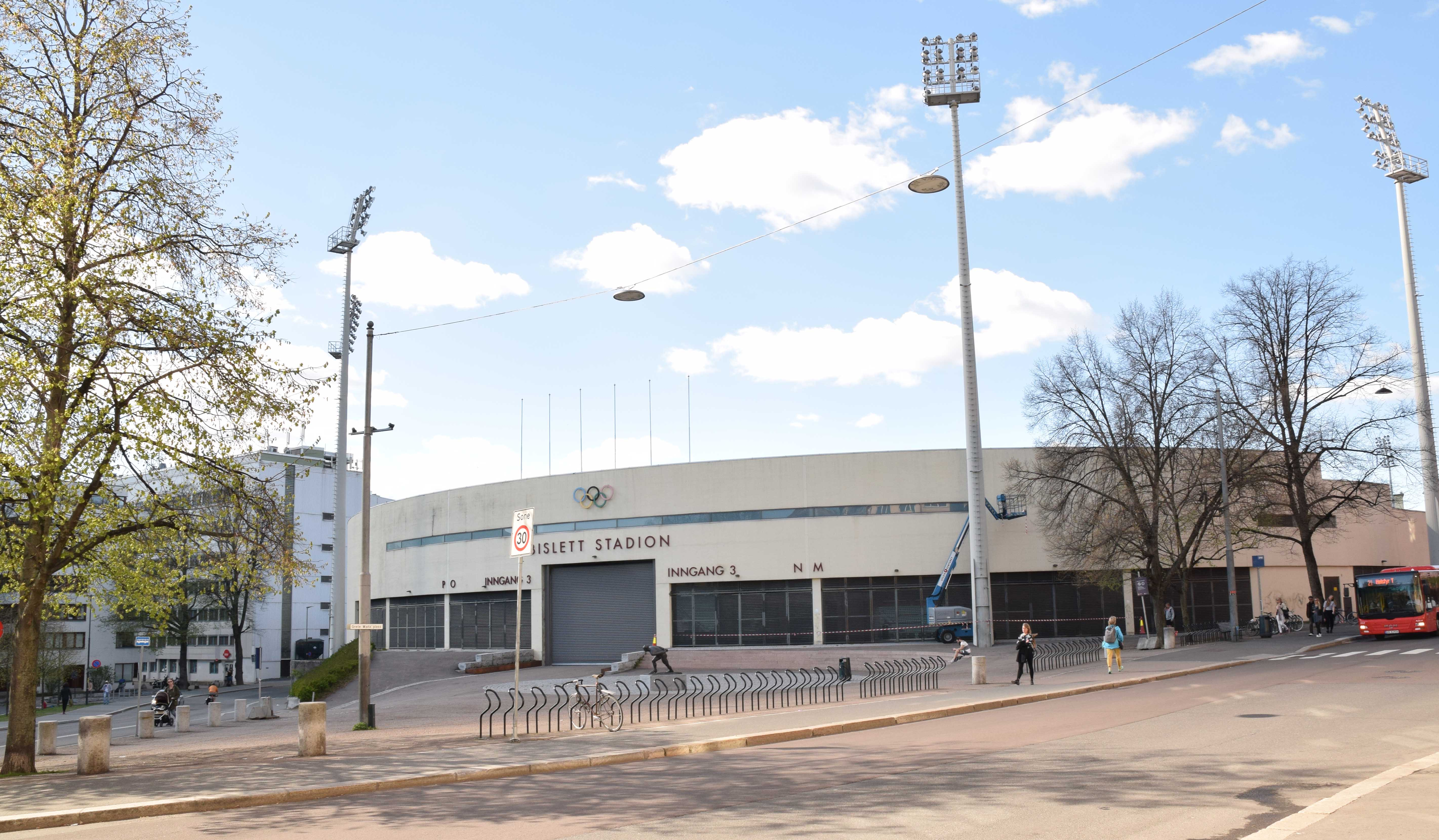 Grete Waitz' plass ved inngang 3 Bislett stadion syd. Sofies gate til høyre